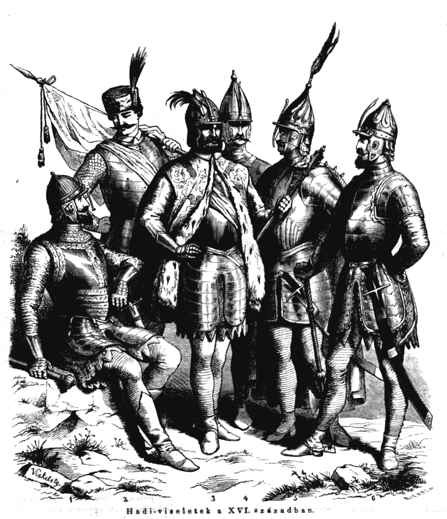 Vízkelety Béla Hadi viseletek a XVI. században illusztráció a Vasárnapi Újságban